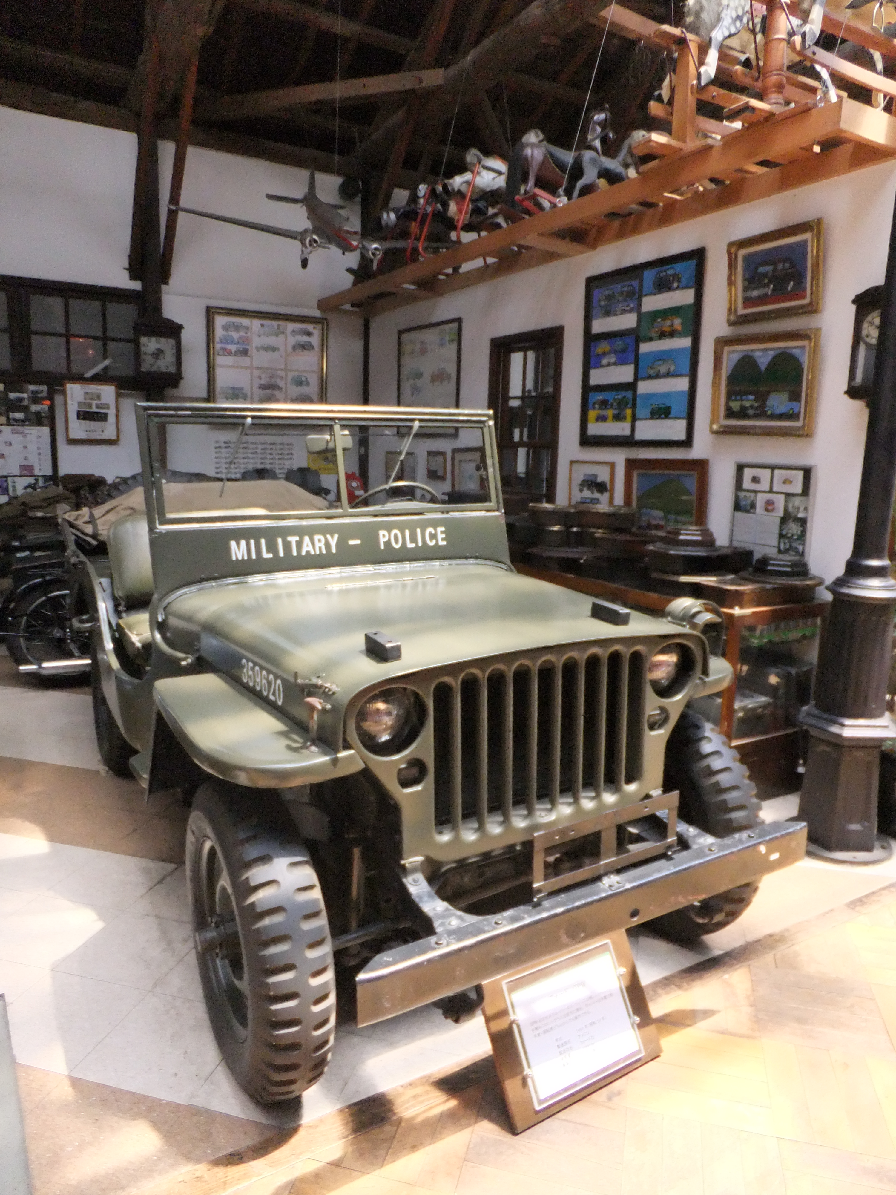 福山自動車時計博物館所蔵 FORD GPW JEEP